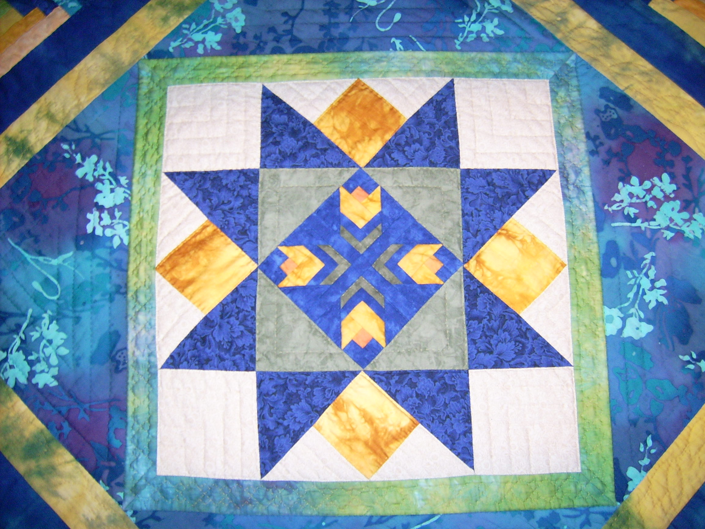 Patchwork: "Estrella de Ohio con tulipanes"